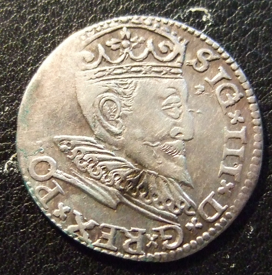 POLAND, SIGISMUND III 1594 ---3 GROSCHEN b